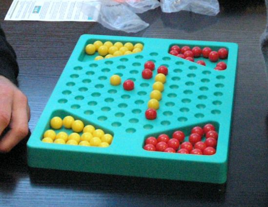 Bōku (desková hra /board game)